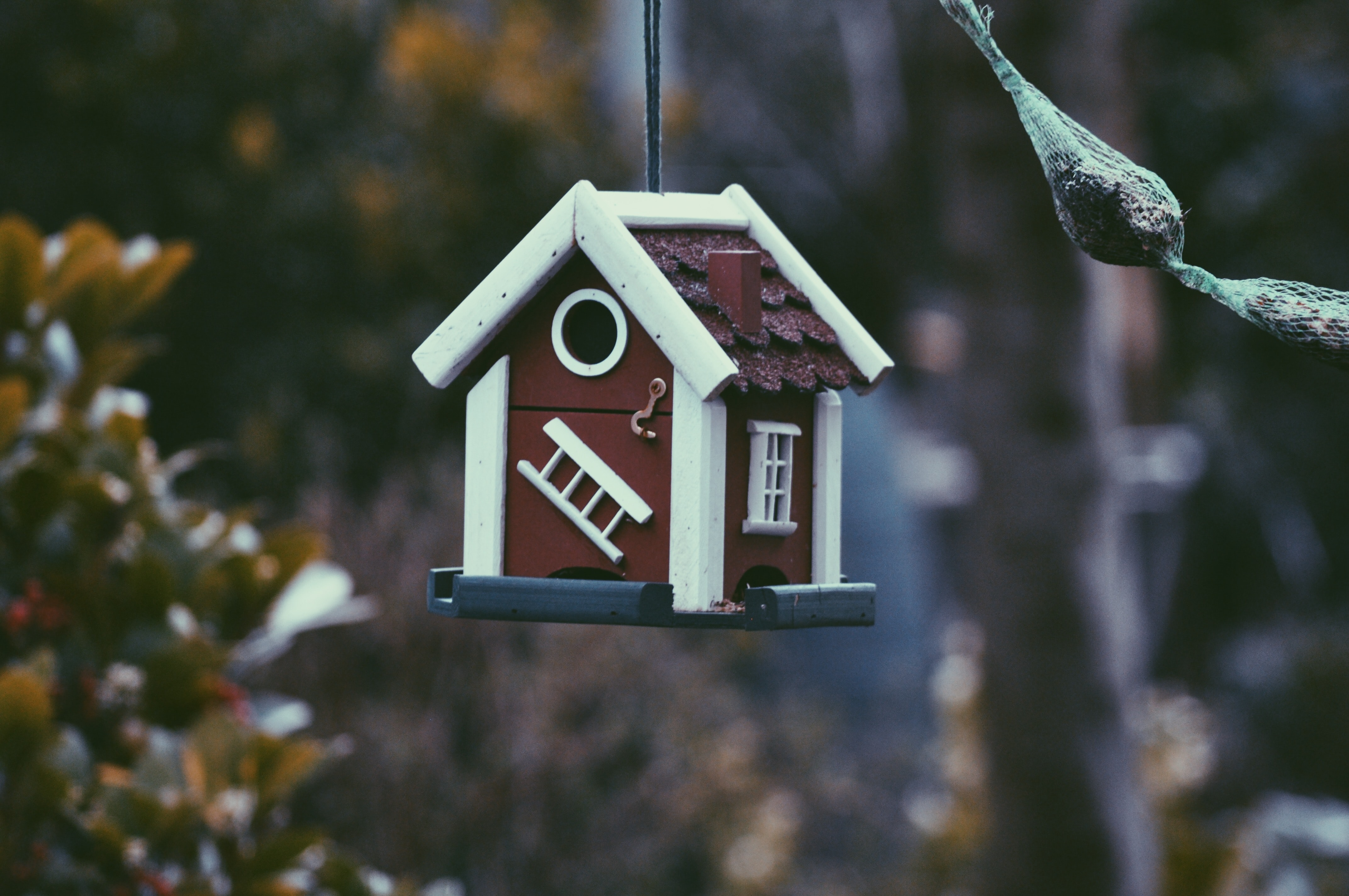 Vogelhuis in de tuin. Foto gemaakt door: Harmen Jelle van Mourik